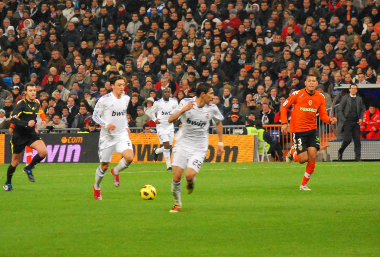 La Liga 4 de Diciembre 2010 Real Madrid 2 - Valencia 0